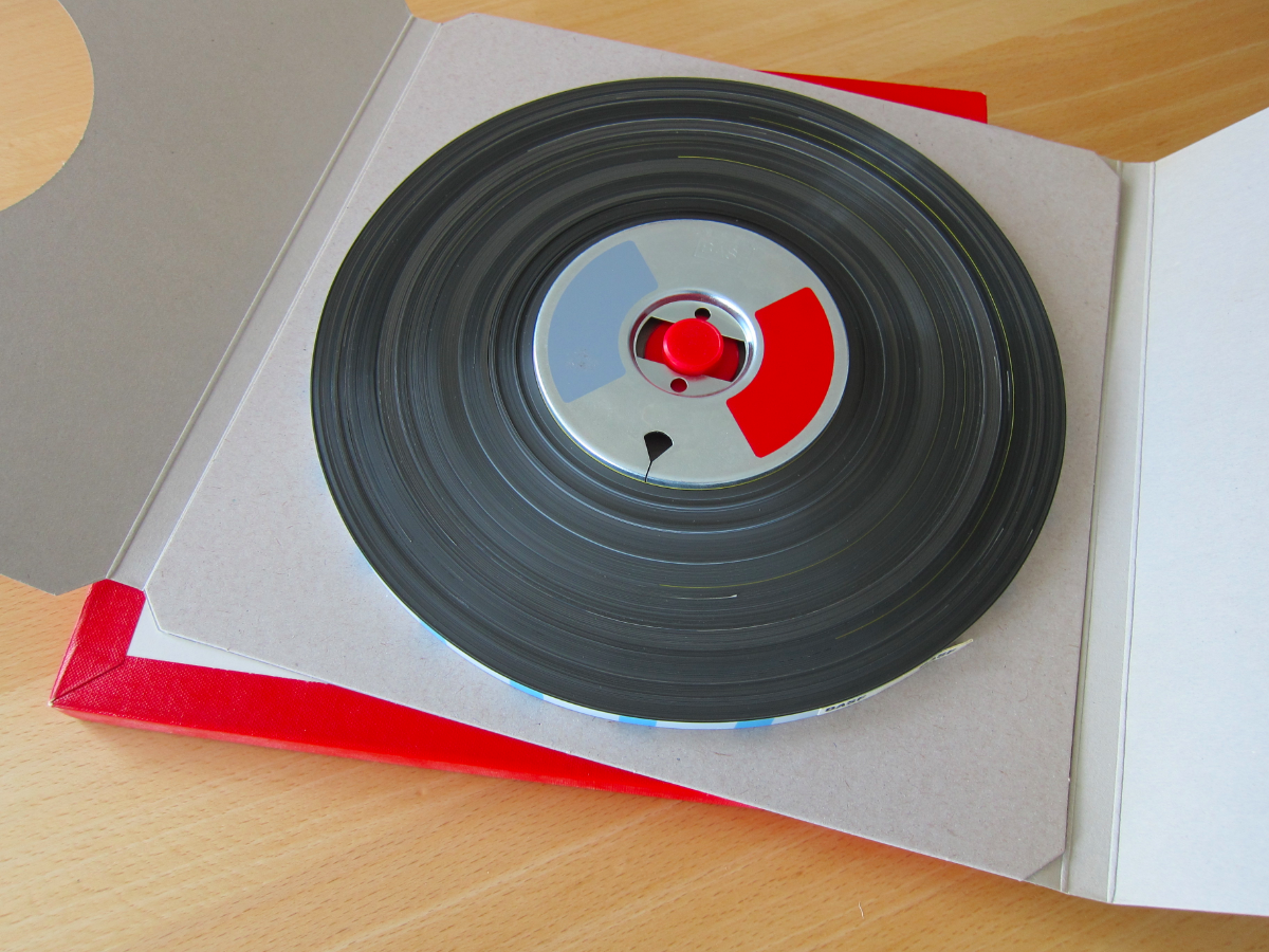 Tonbandwickel auf einem AEG-Wickelkern (Bobby), inkl. Kartonschuber